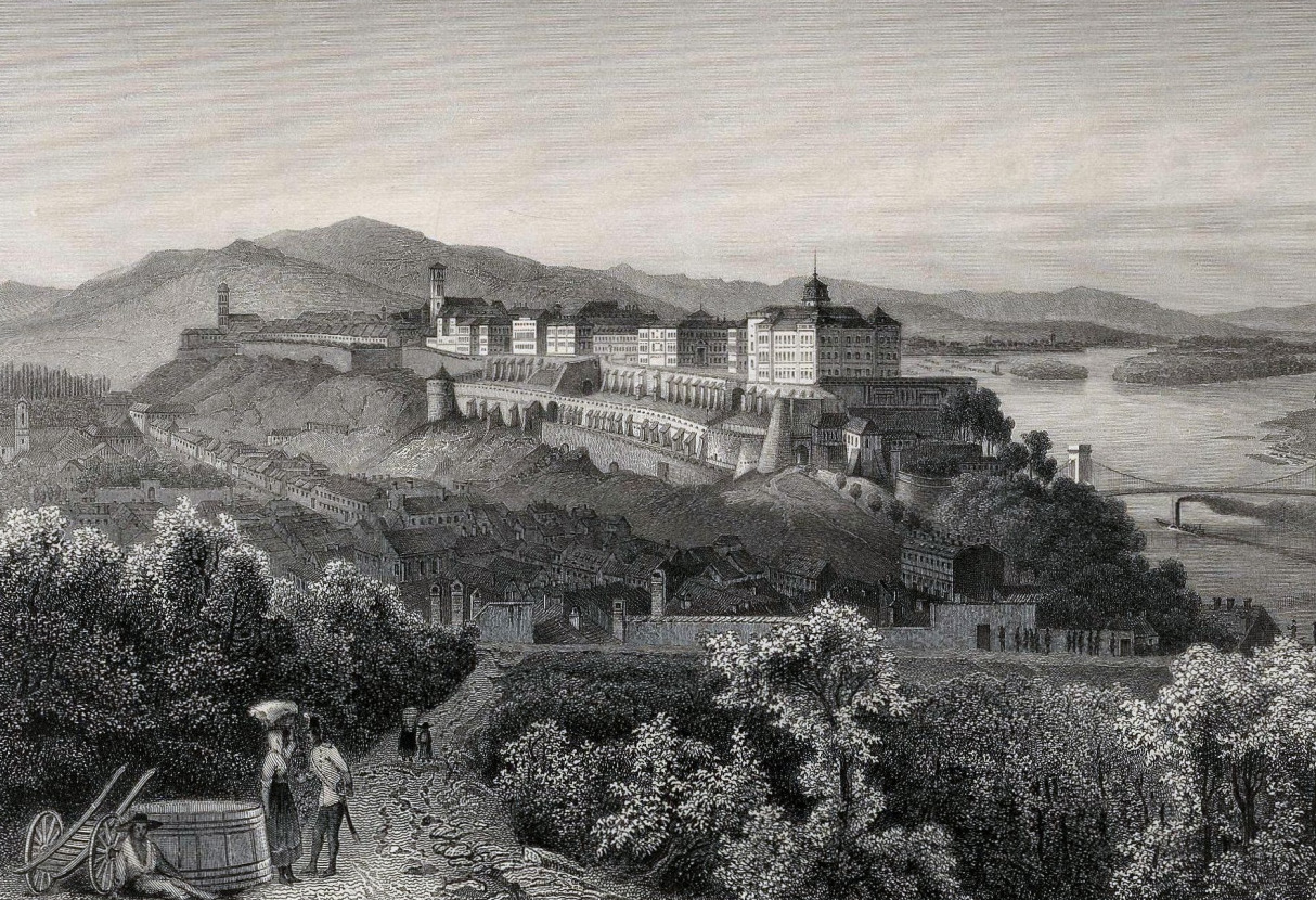 "Magyarország és Erdély eredeti kepeken" Hunfalvy János (1820 - 1888)